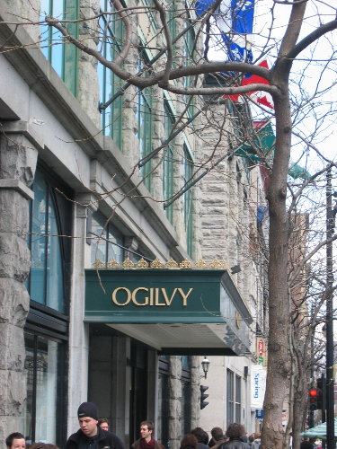 Entrance to Ogilvy department store in Montreal, Canada